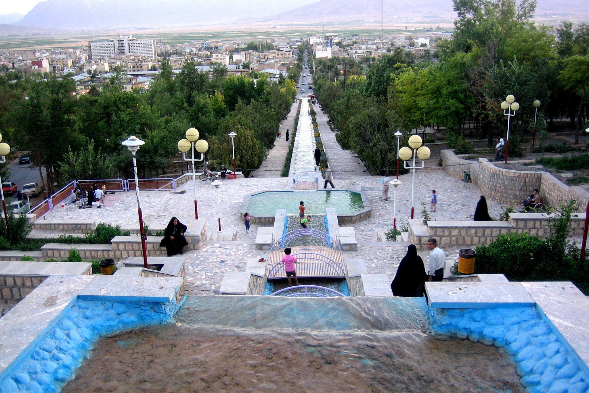 بوستان ملت